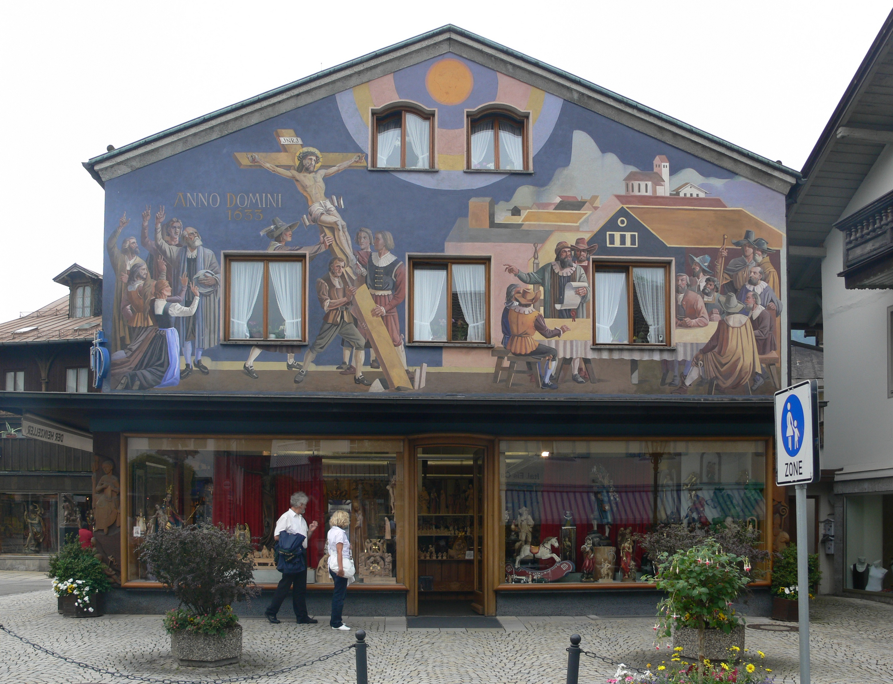 Oberammergau, Haus Dorfstraße 18, Wandmalerei mit Passionsspielszene